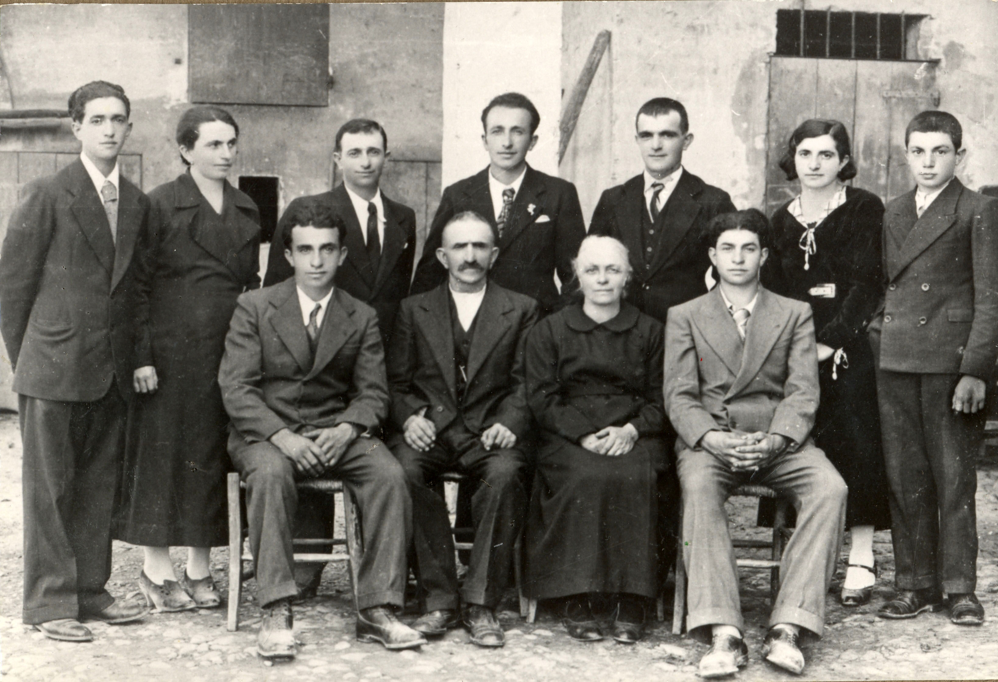 I sette fratelli Cervi: Gelindo (nato il 7 agosto 1901); Antenore (1906); Aldo (15 febbraio 1909); Ferdinando (1911); Agostino (11 gennaio 1916); Ovidio (13 marzo 1918) ed Ettore (2 giugno 1921). Le due sorelle: Rina e Diomira Cervi. I genitori: Alcide Cervi (1875-1970) e Genoeffa Cocconi (1876-1944).